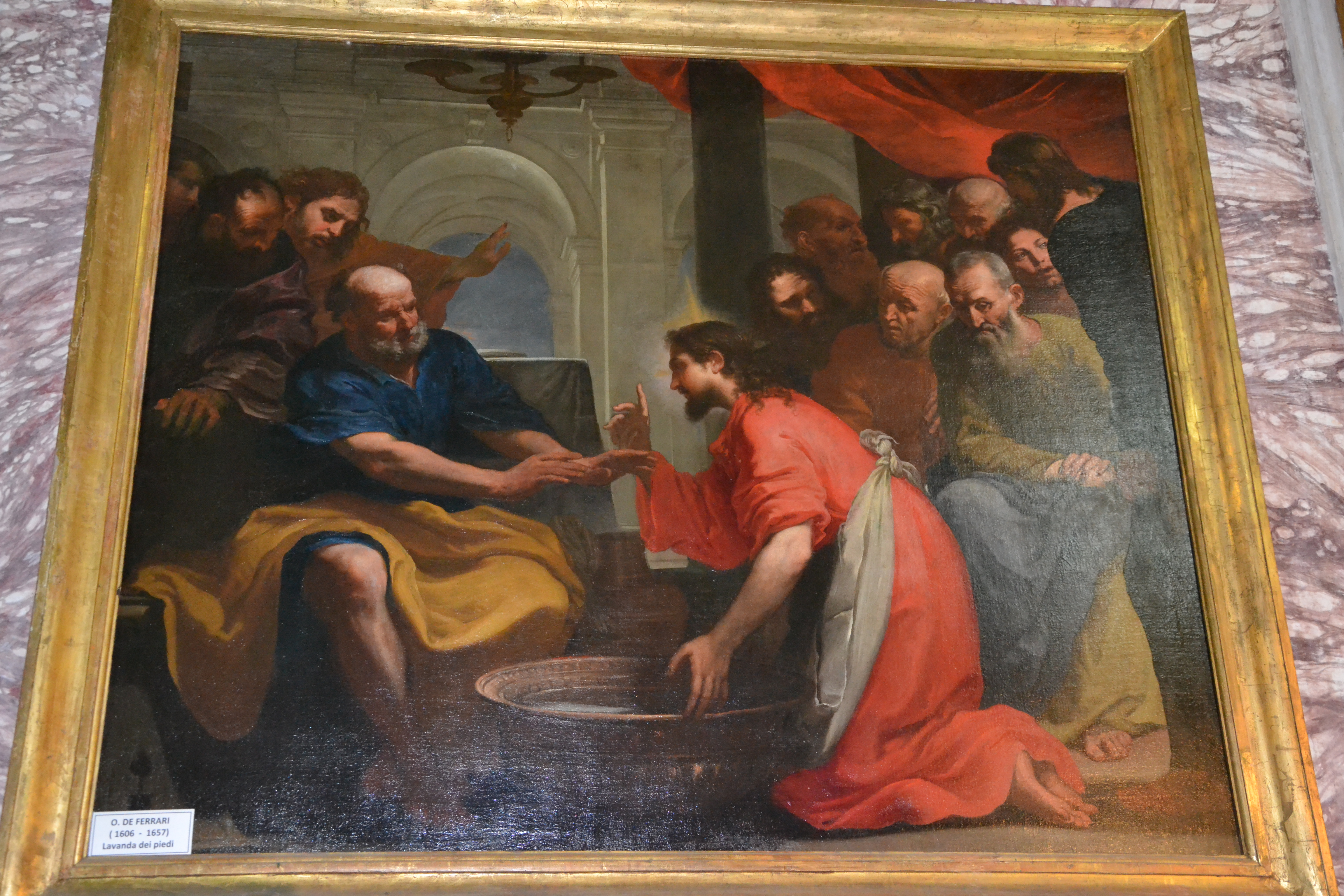 Chiesa di San Francesco da Paola (Genova) Orazio De Ferrari, Lavanda dei piedi